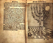 Bibel von 1535, dänische Übersetzung des Alten Testaments von Hans Tausen, gedruckt von Michael Lotter; Lizenz:gemeinfrei